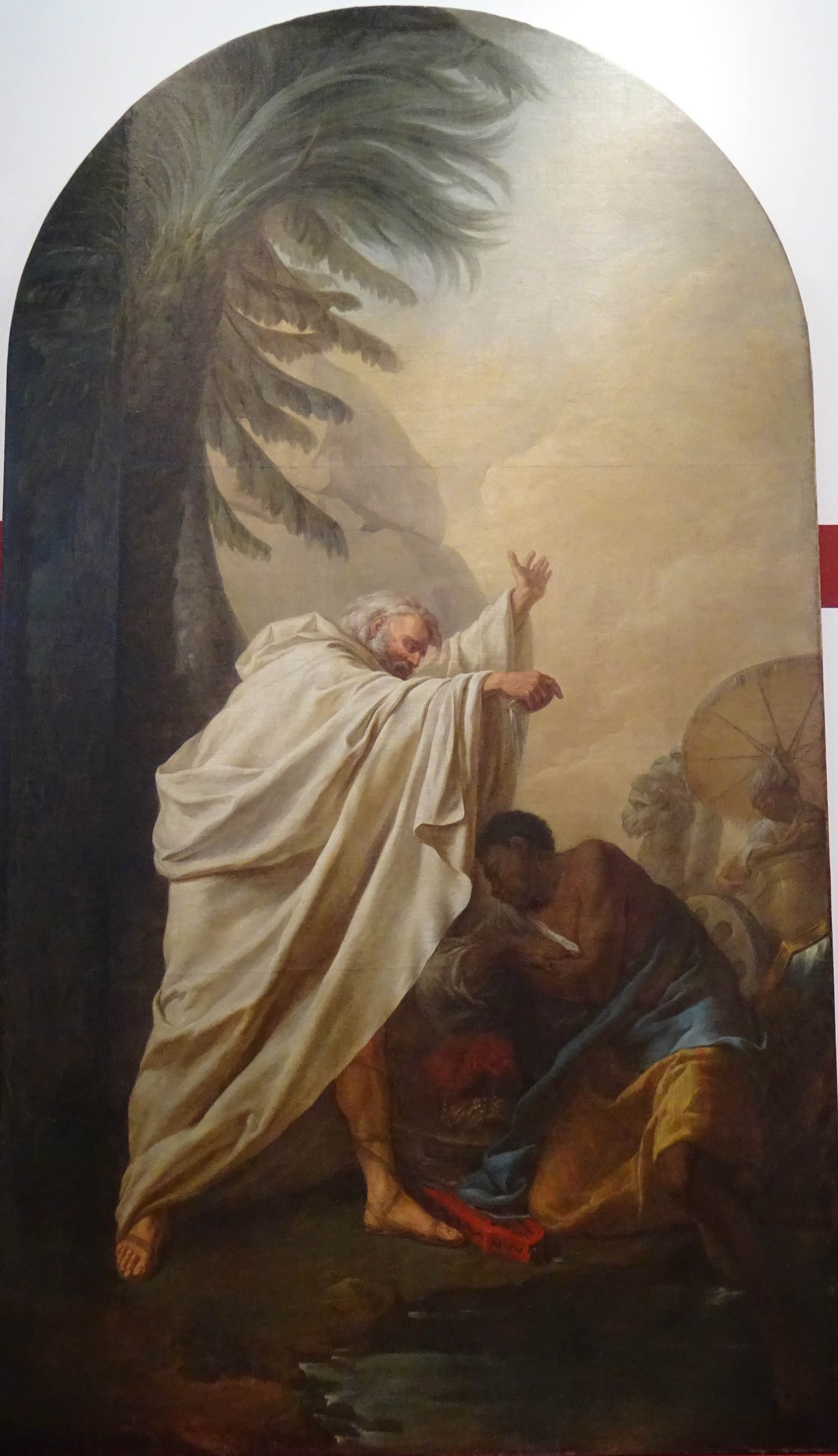 Le Diacre Philippe baptisant l'eunuque, huile sur toile - 338 x 191 cm